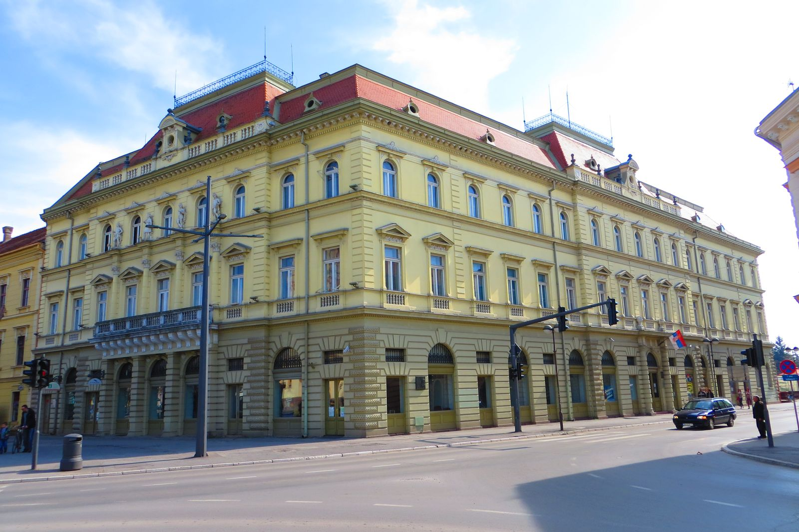 Narodni muzej